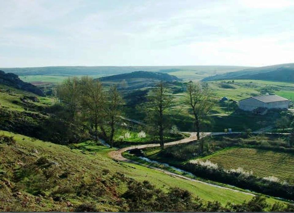 El río Urbel entrando en pueblo.